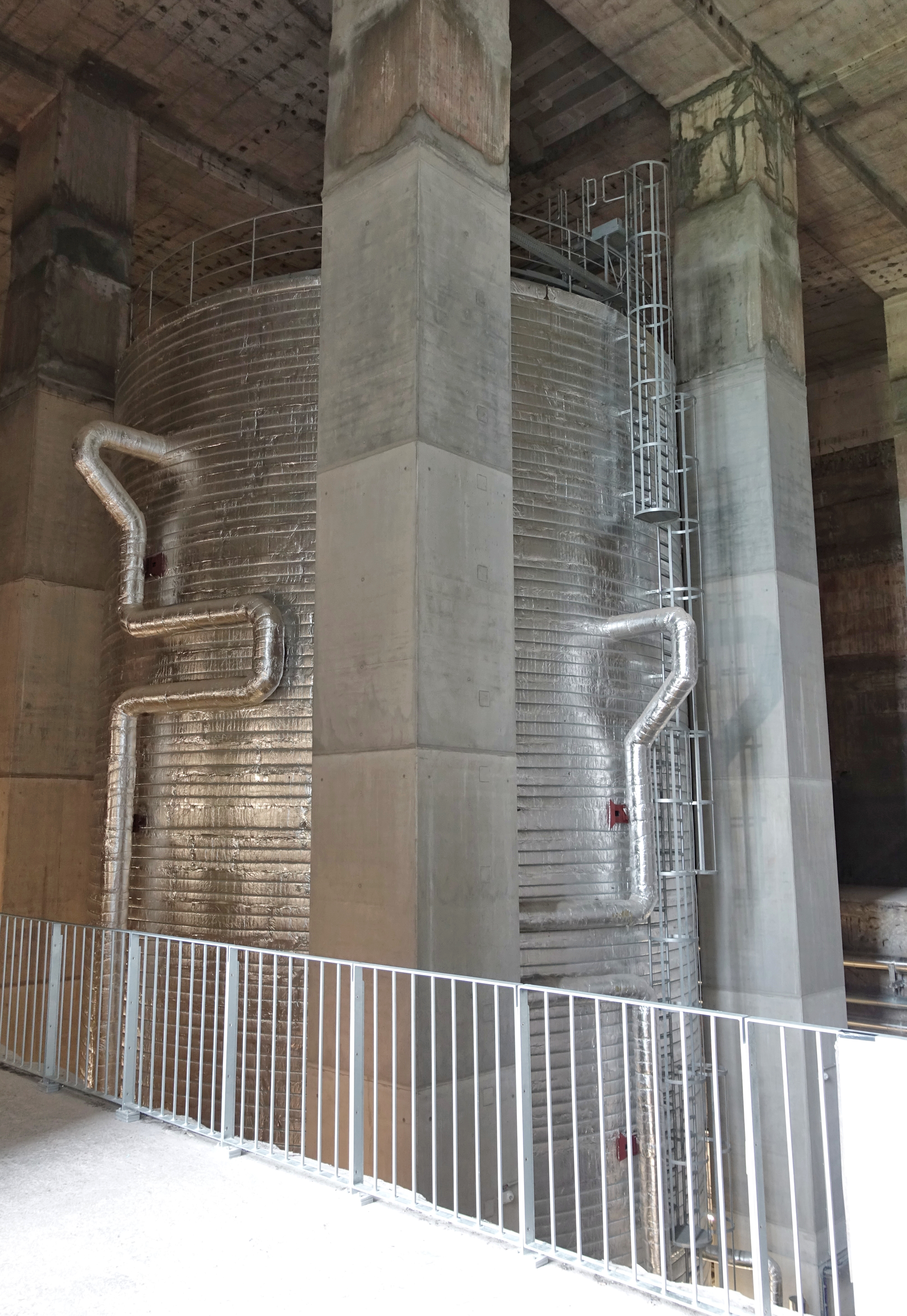 Energiebunker Wilhelmsburg (vormals Flakturm VI) Wärmespeicher im Innenraum, mit zwei Millionen Litern Wasser gefülltThis is a photograph of an architectural monument.